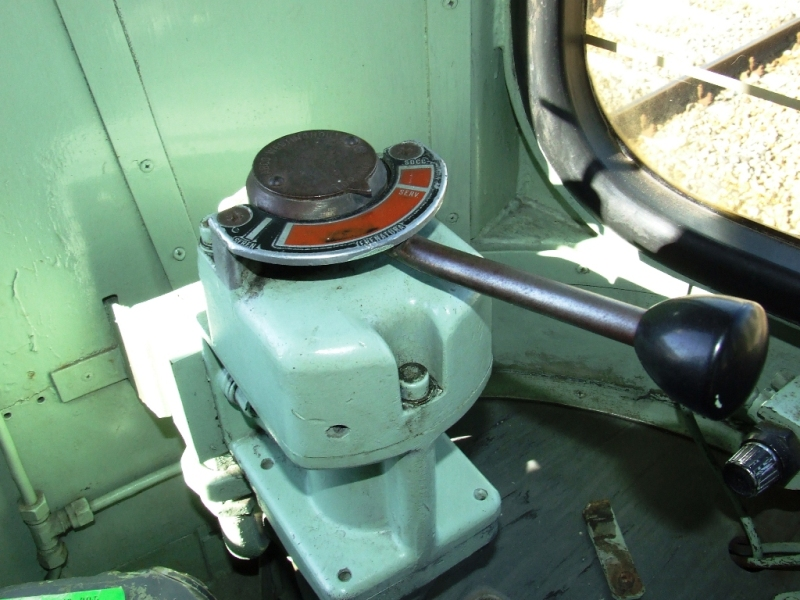 rubinetto del freno diretto tipo RA-M2